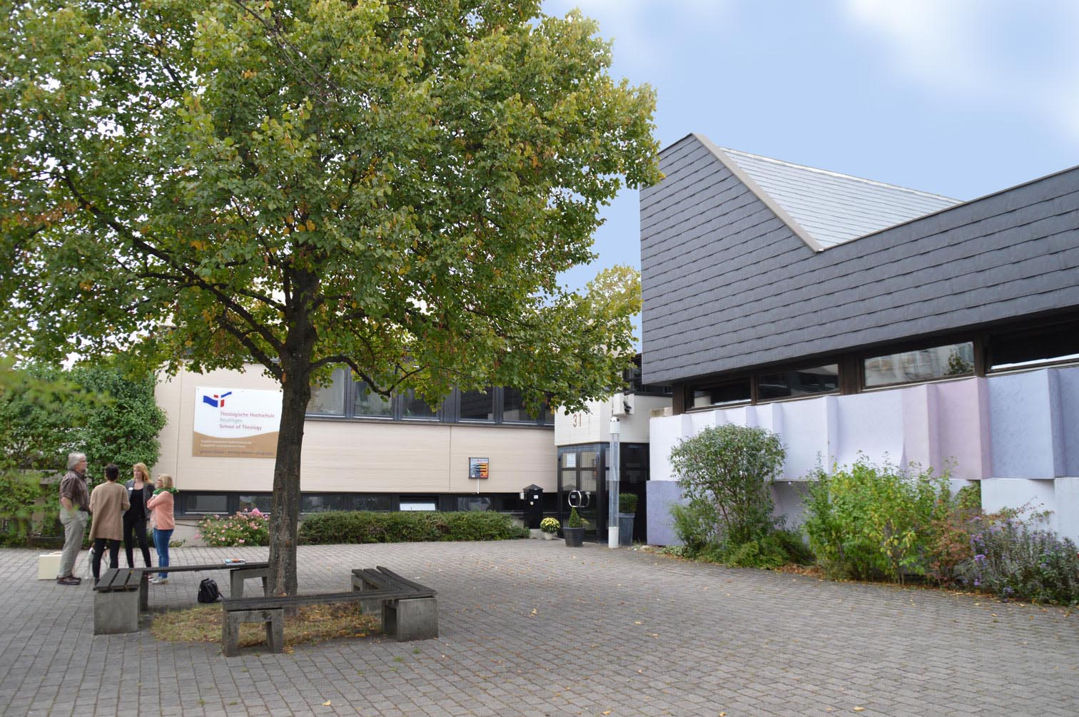 THR Eingang zum Lehrgebäude